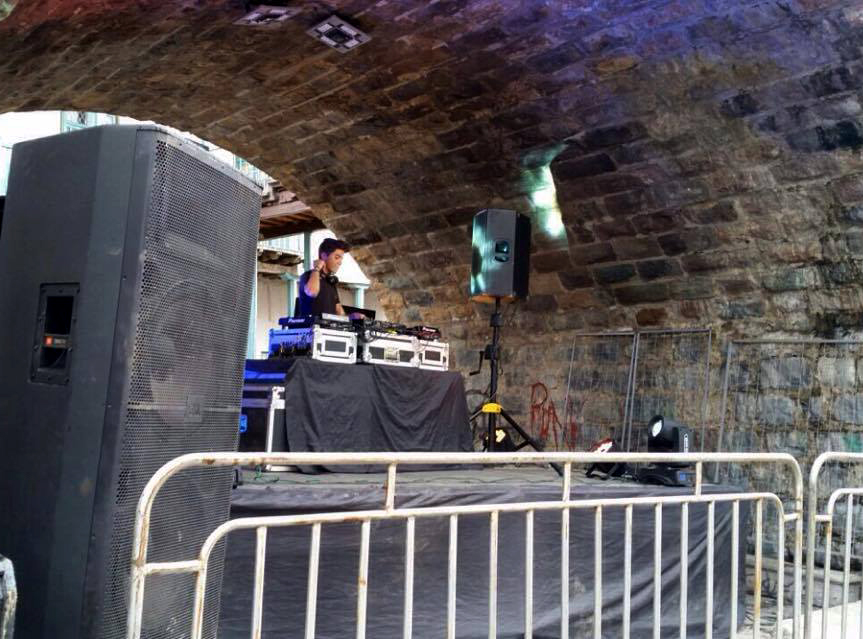 Geamclo tocando en el "Geamclo en LAST Music Fest 2016" con el fin de una ayuda benéfica en Loja